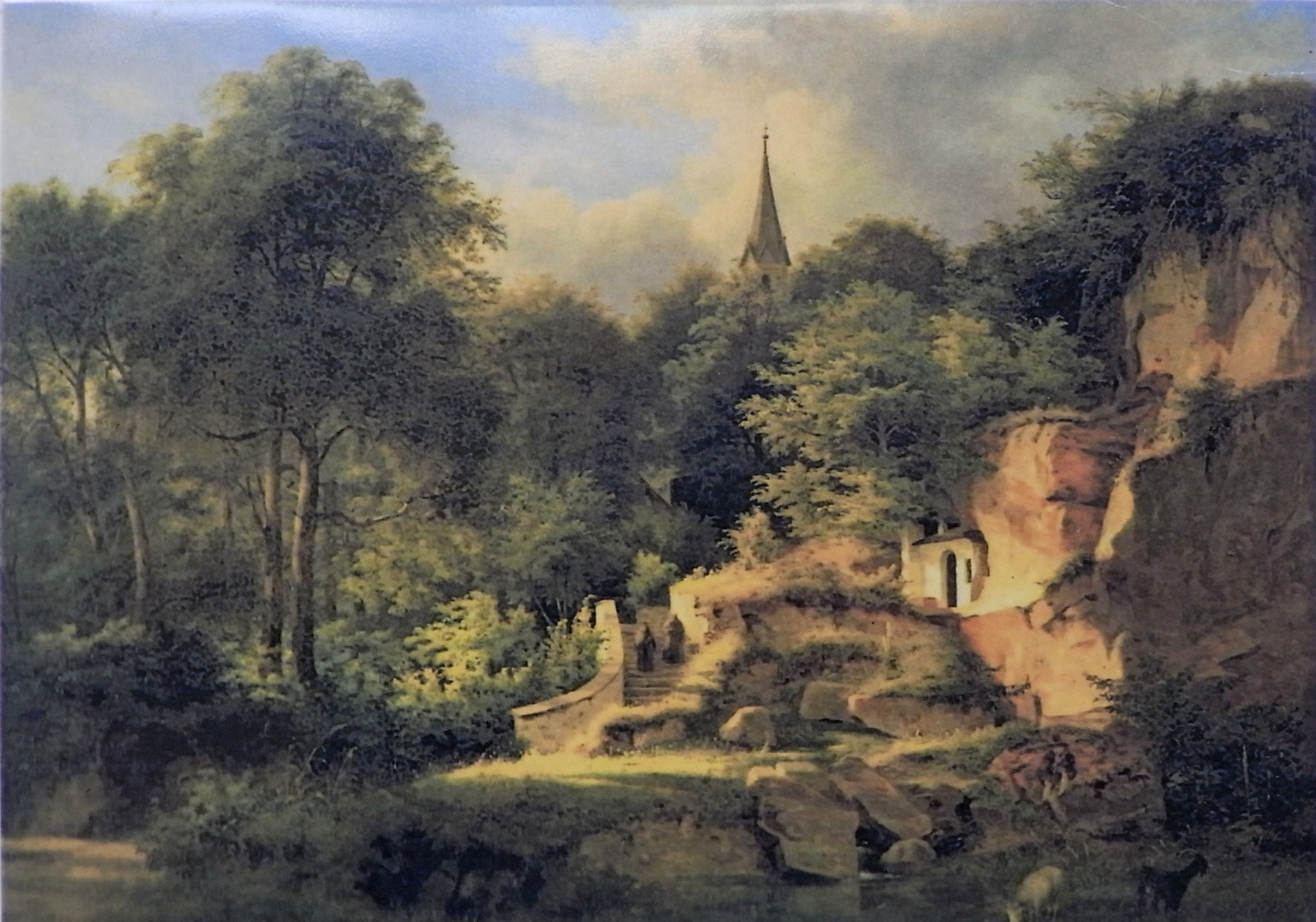 Landschaft von Johann Paul Mohr (1808–1843): "An der Biberklause"; die Biber in Brannenburg, Wallfahrtskirche Maria Magdalena.